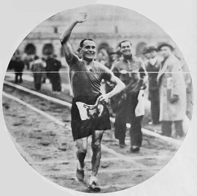 L'atleta italiano Ettore Rivolta vince la "Cento chilometri" della Gazzetta dello Sport 1933